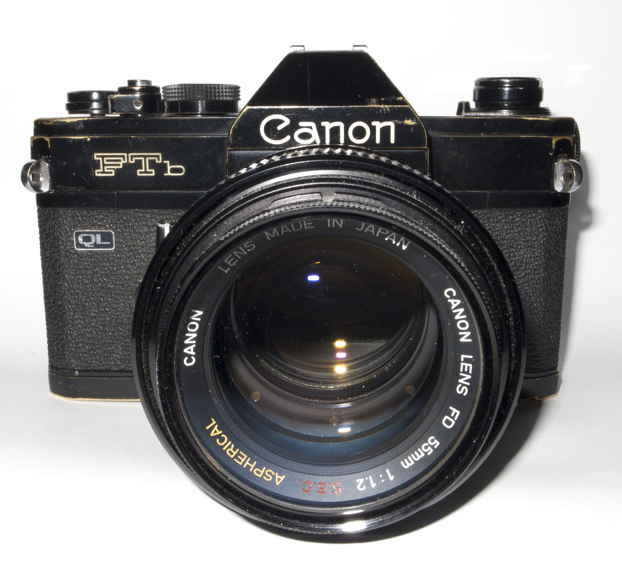 Canon FTb N mit 1.2/55mm ASPH.-Objektiv